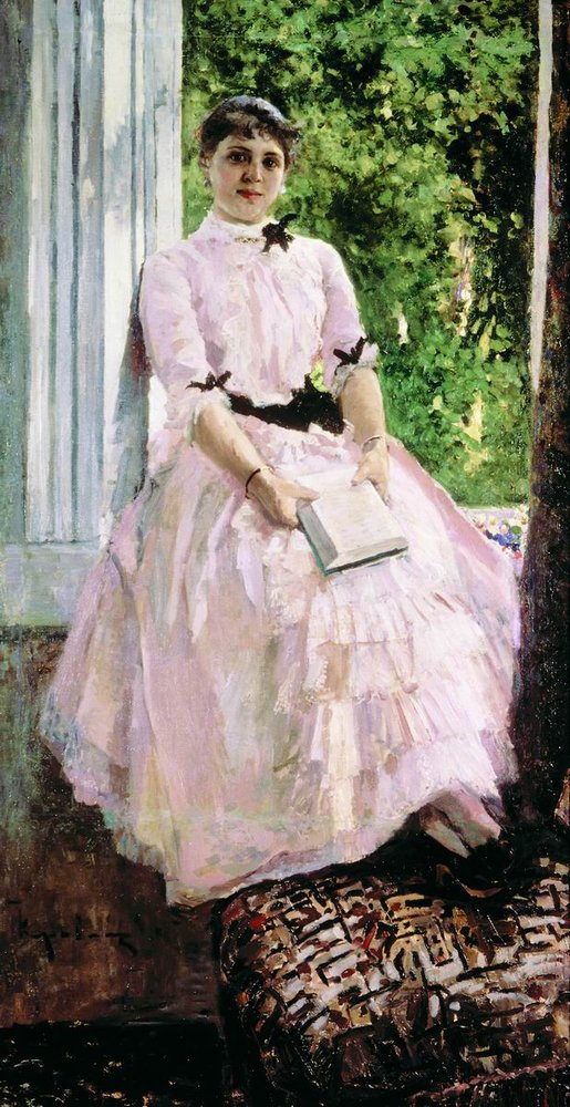 Просмотров 135